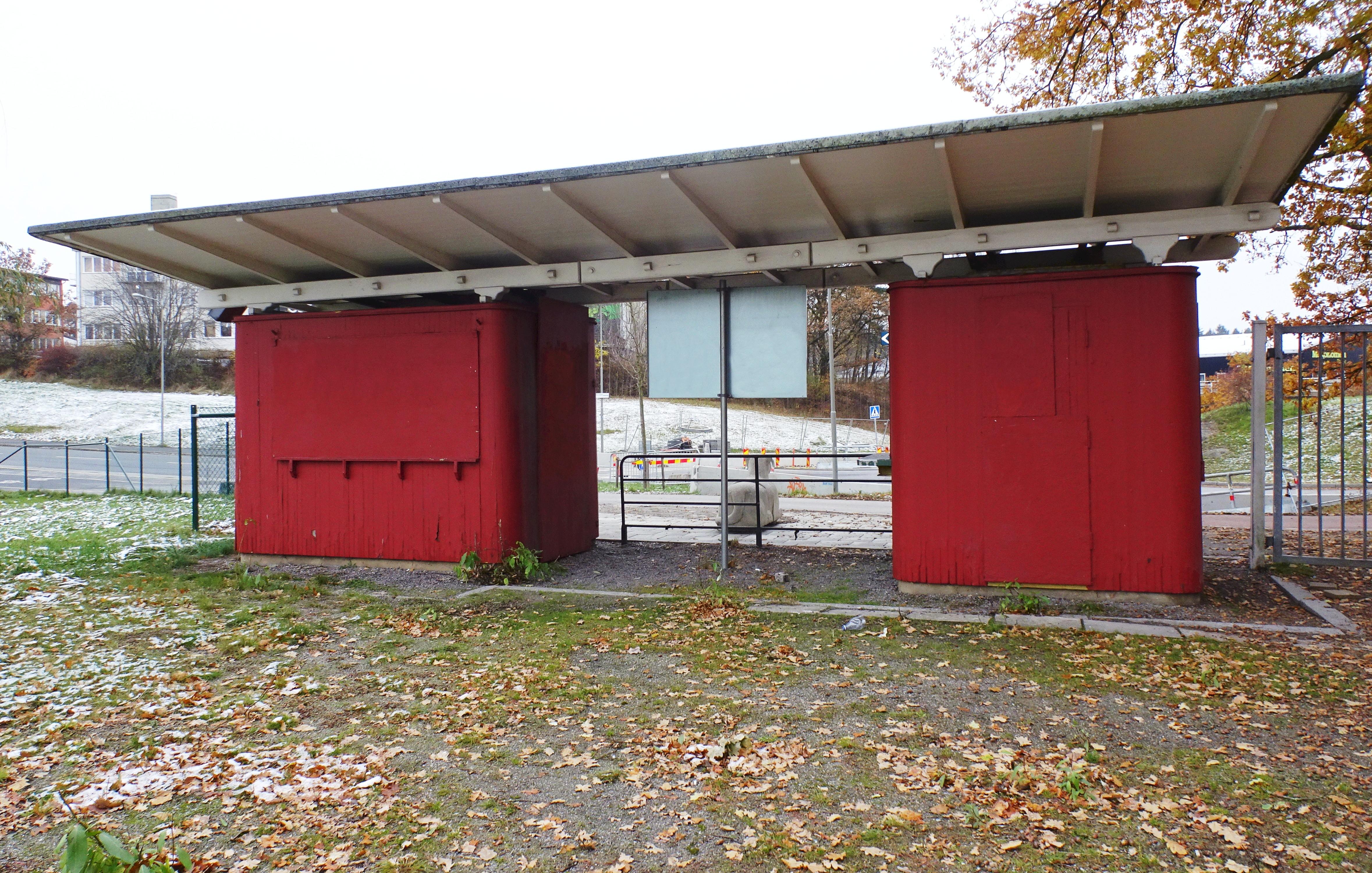 Älvsjöbadet, entrébyggnad